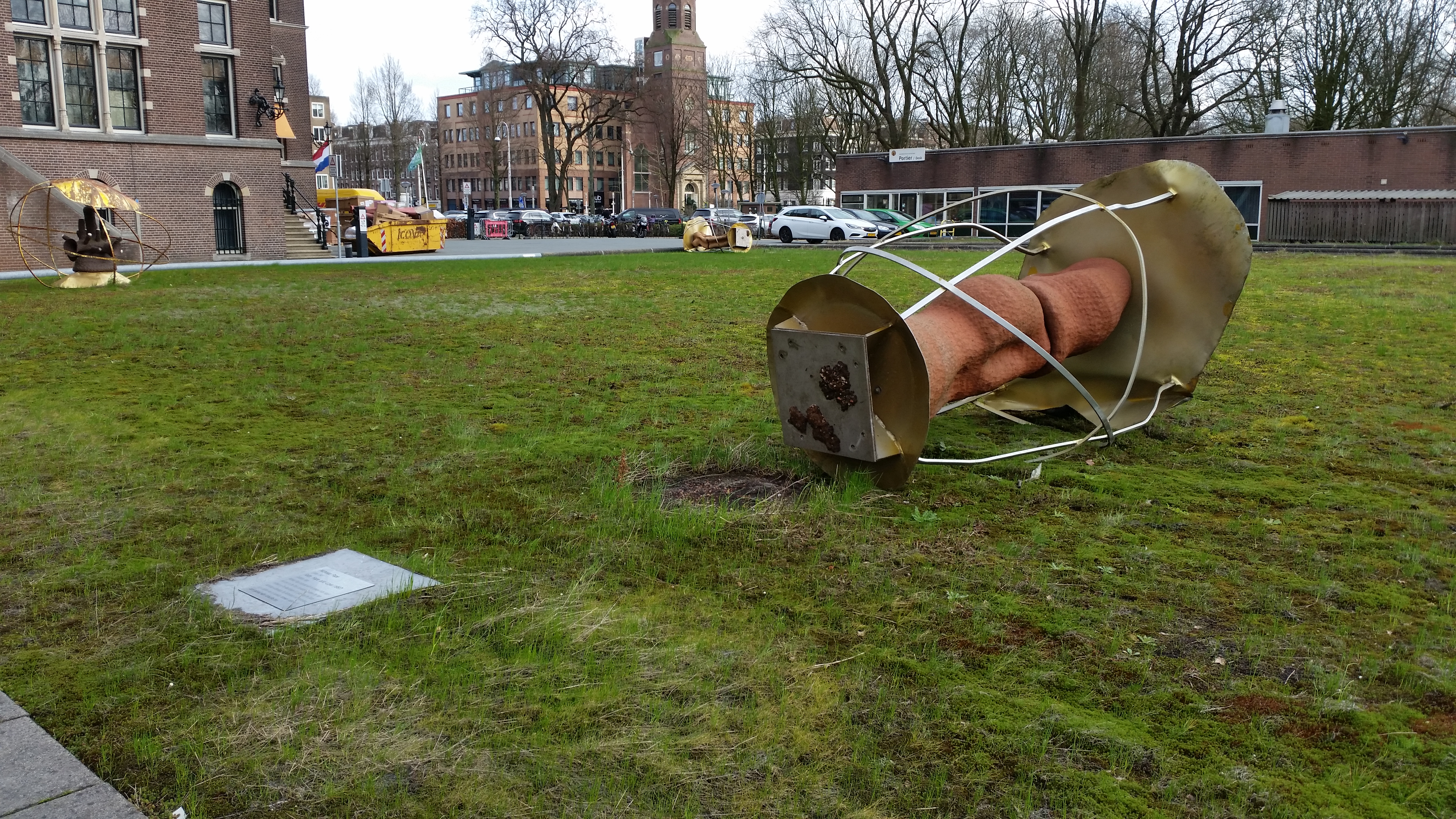 Impressie van Geloof, hoop en liefde, omver gewaaid tijdens een februaristorm 2020 in een tuin achter het Tropenmuseum.